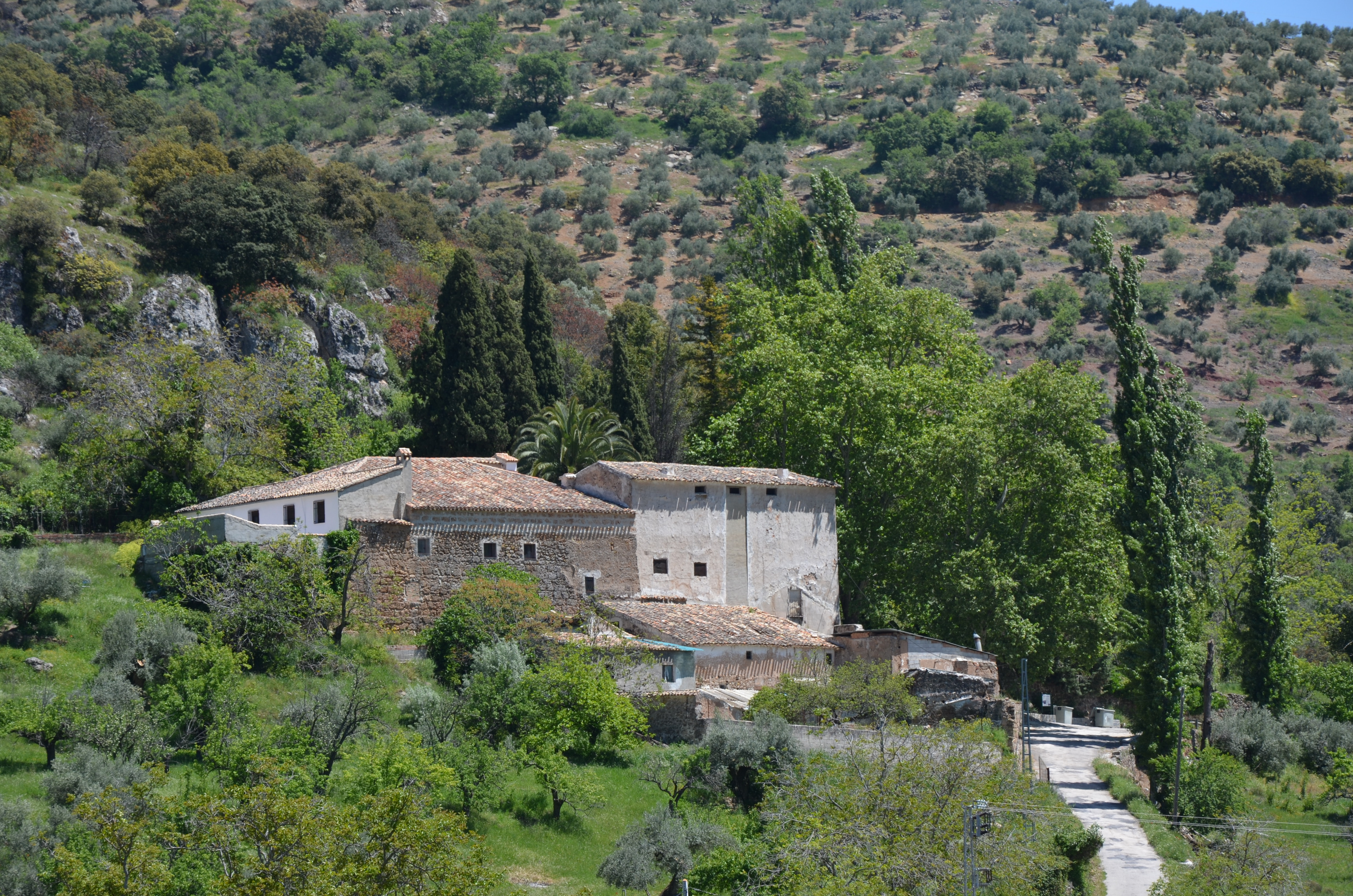 Construído en el siglo XVI ha sufrido diversos cambios hasta la actualidad.